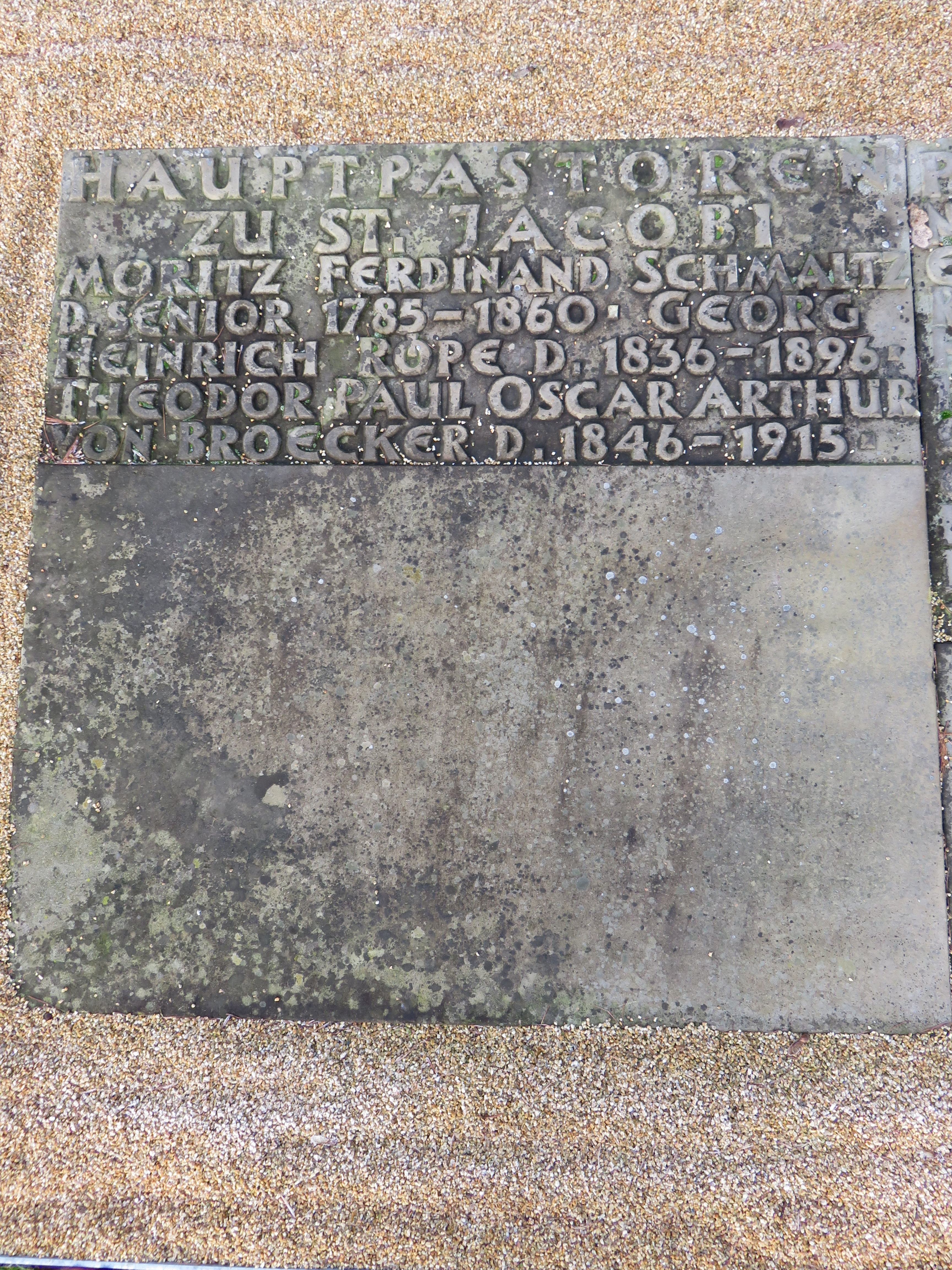 Doppelsammelgrab Hauptpastoren zu St. Jacobi / Pastoren zu St. Jacobi im Bereich des Althamburgischen Gedächtnisfriedhofs auf dem Hamburger Friedhof Ohlsdorf zu Ehren von unter anderen Moritz Ferdinand Schmaltz, Georg Heinrich Röpe, Arthur von Broecker, Hermann Rentzel, Ludwig Heinrich Kunhardt.